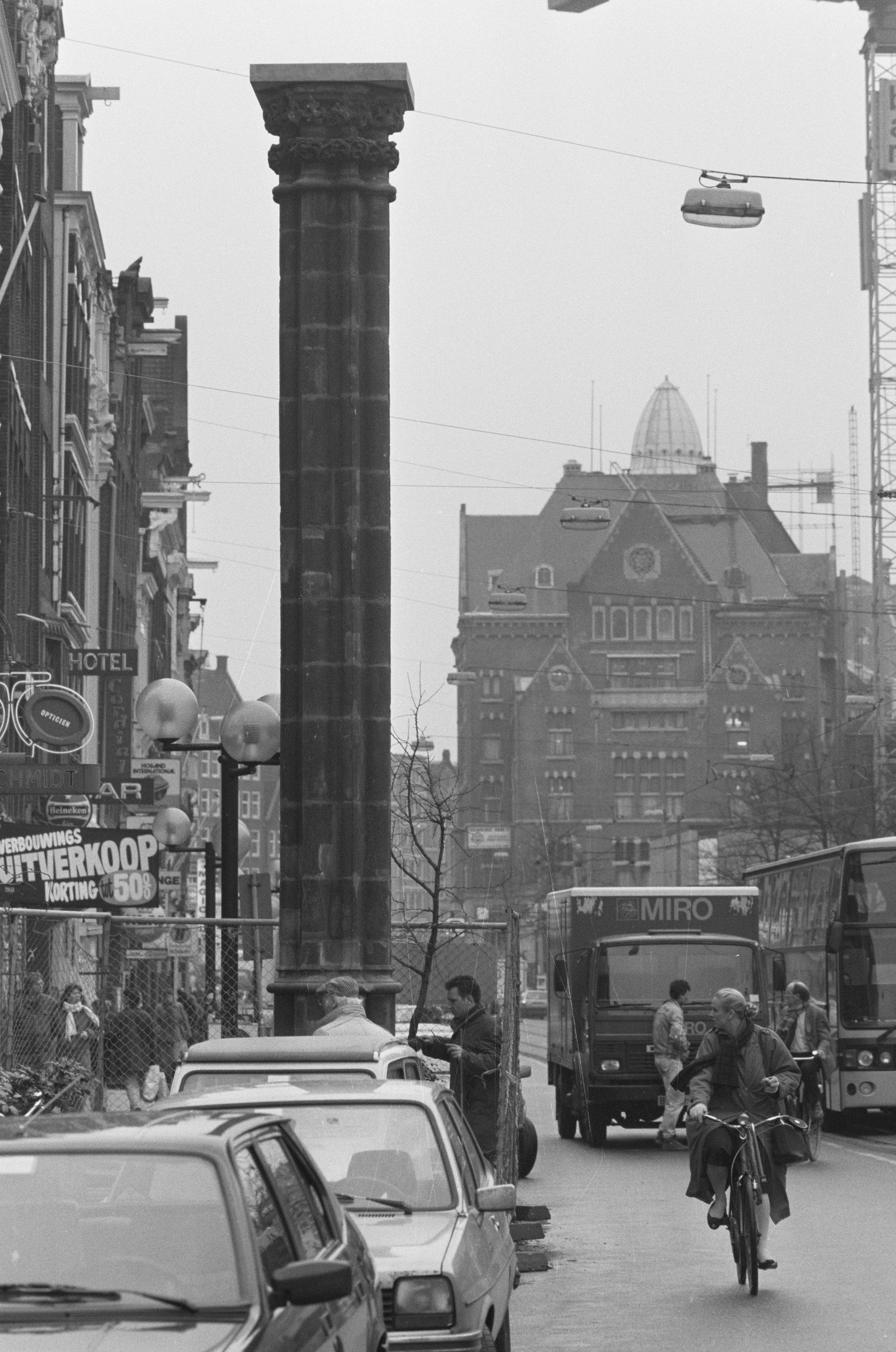 Mirakelkolom op Rokin, samengesteld uit stukken steen 15 eeuwse Nieuwezijds kapel gesloopt in 1908 (1345 hostie)